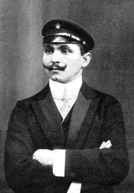 Carl Jörns, deutscher Rennfahrer (1875–1969)